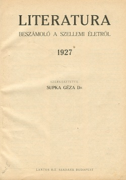 Supka Géza: Literatura - Beszámoló a szellemi életről